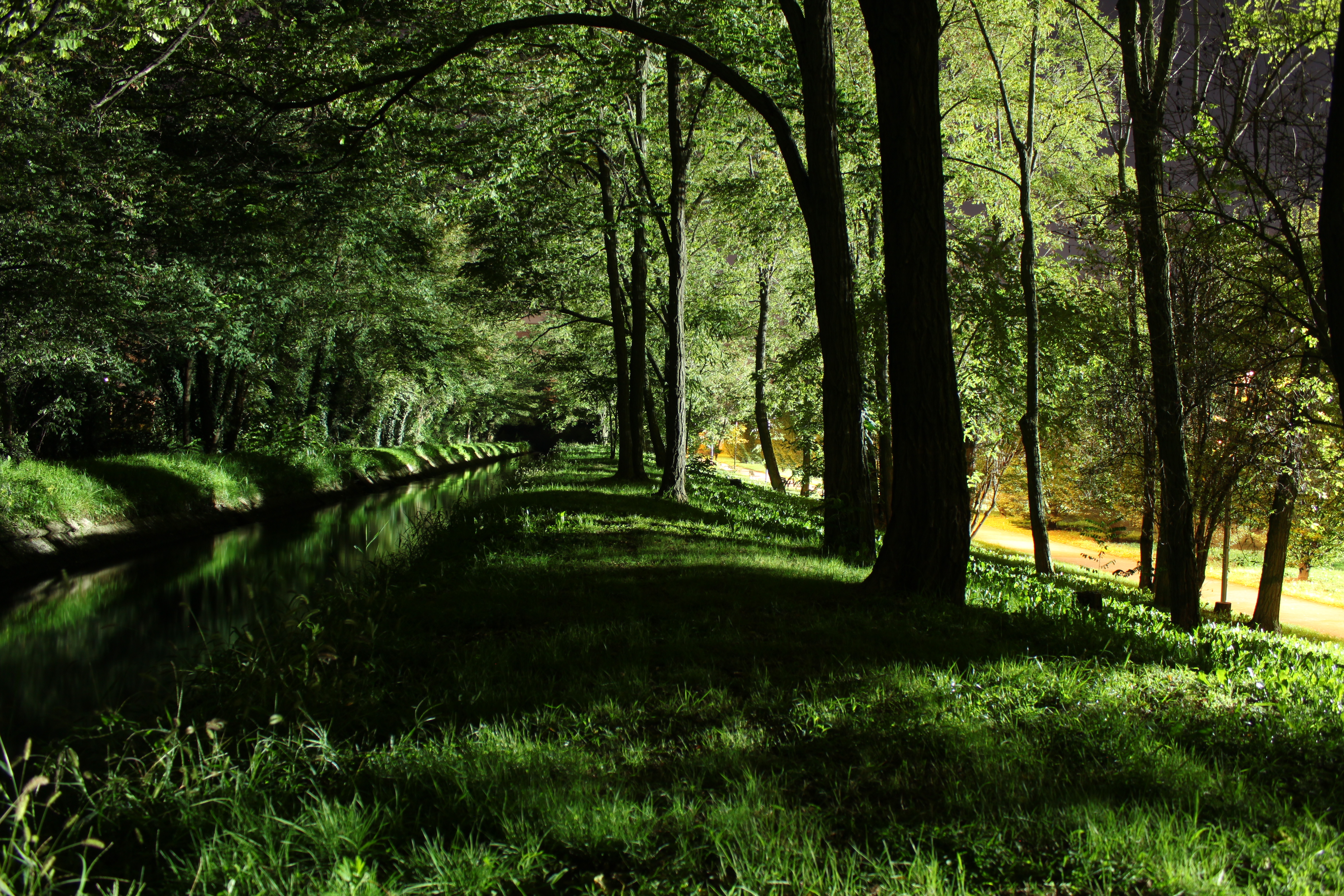 masate bosco villoresi